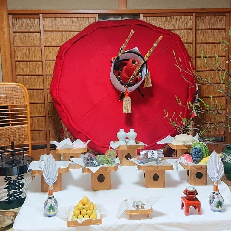 2019年7月頃の様子